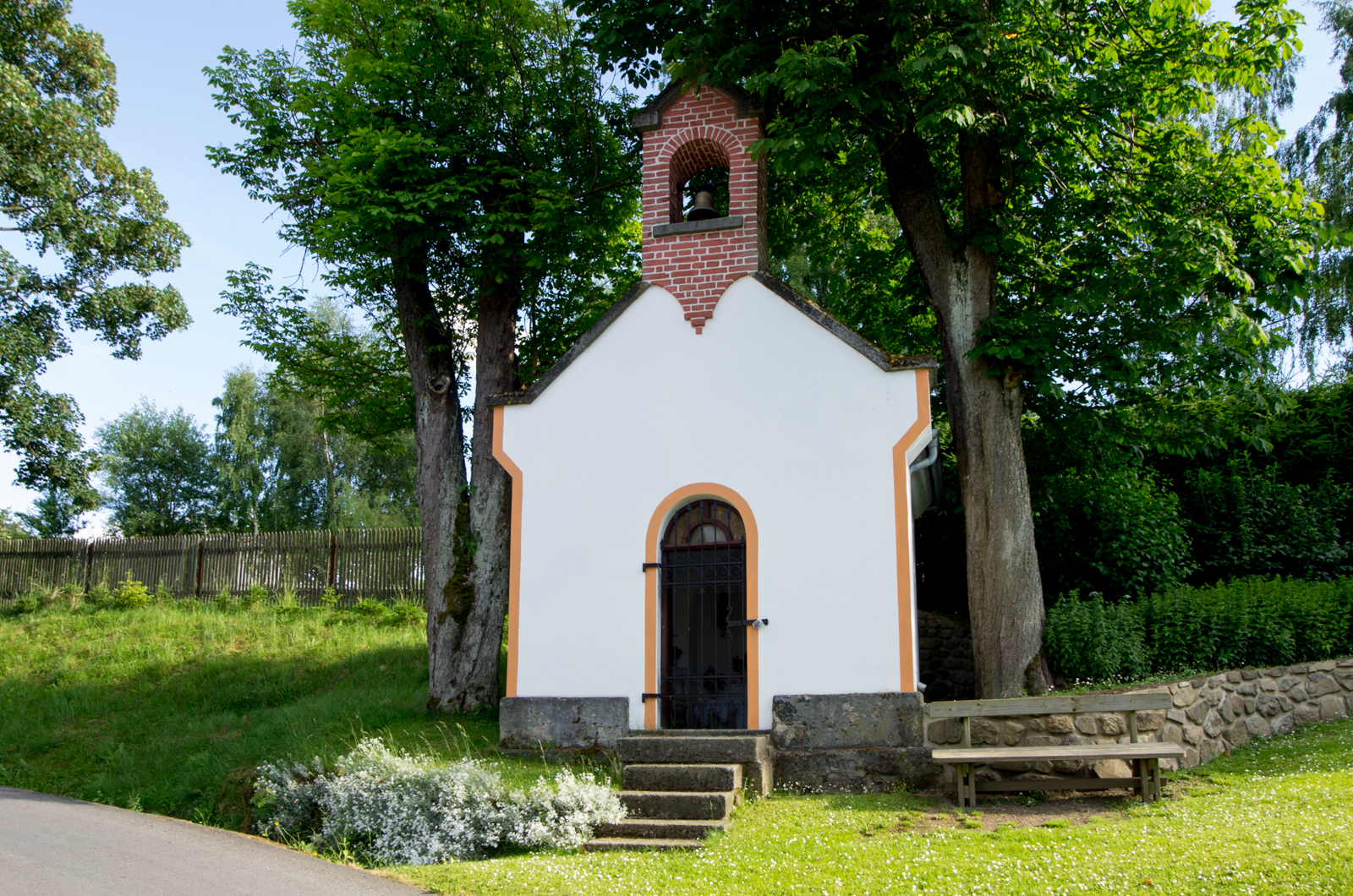 Chodov u Bečova, kaplička sv. Anny, okres Karlovy Vary